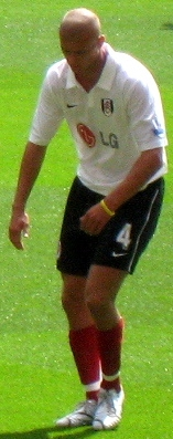 Paul Konchesky